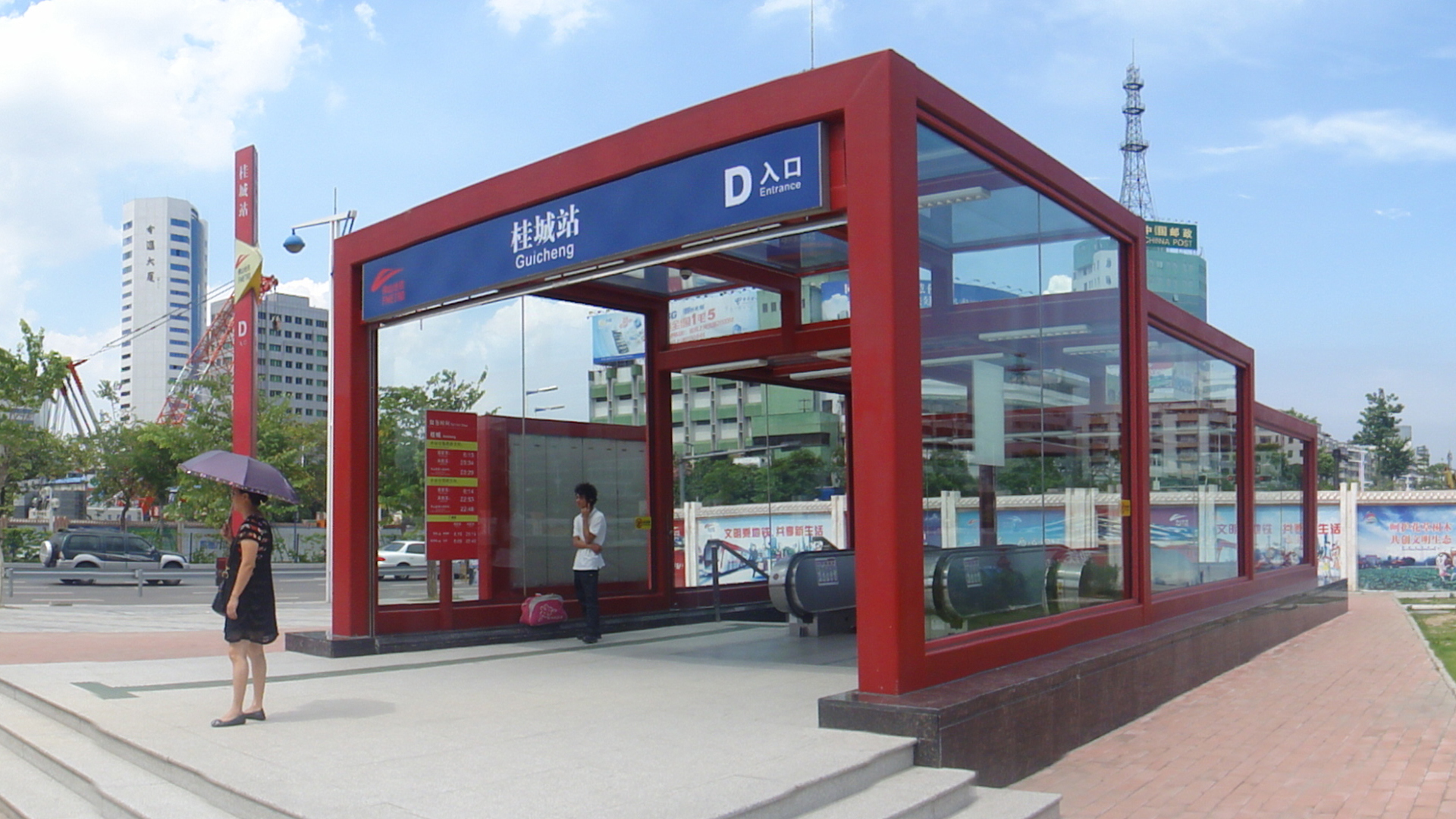 广佛地铁桂城站D出入口